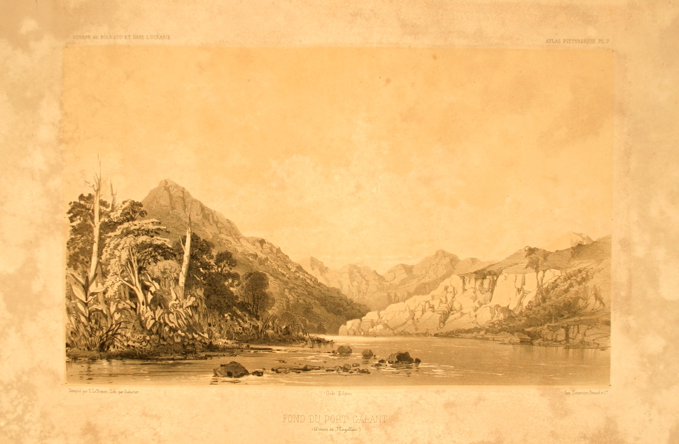 Fond du Port Galant, détroit de Magellan. Atlas pittoresque, planche 07